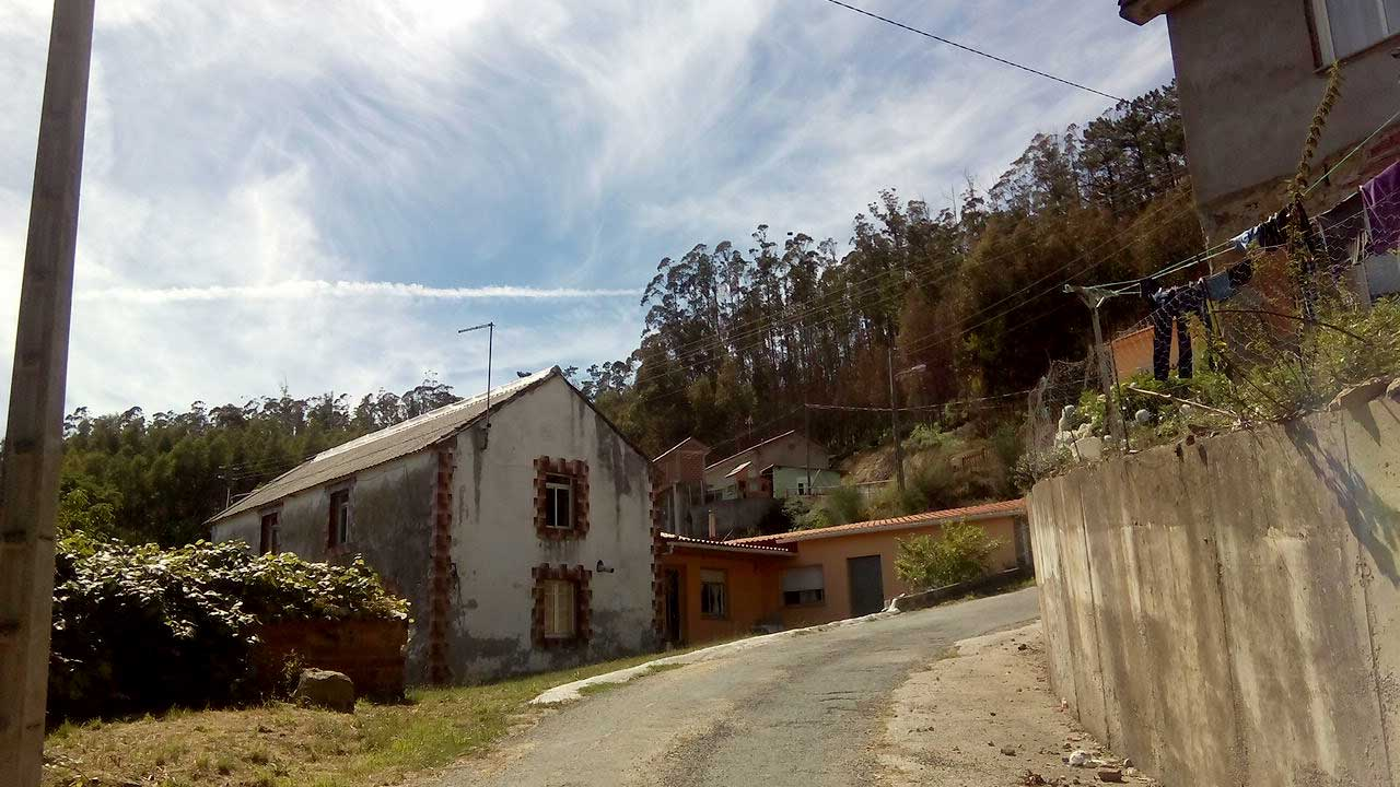 Vista dos Outeiros, O Val.